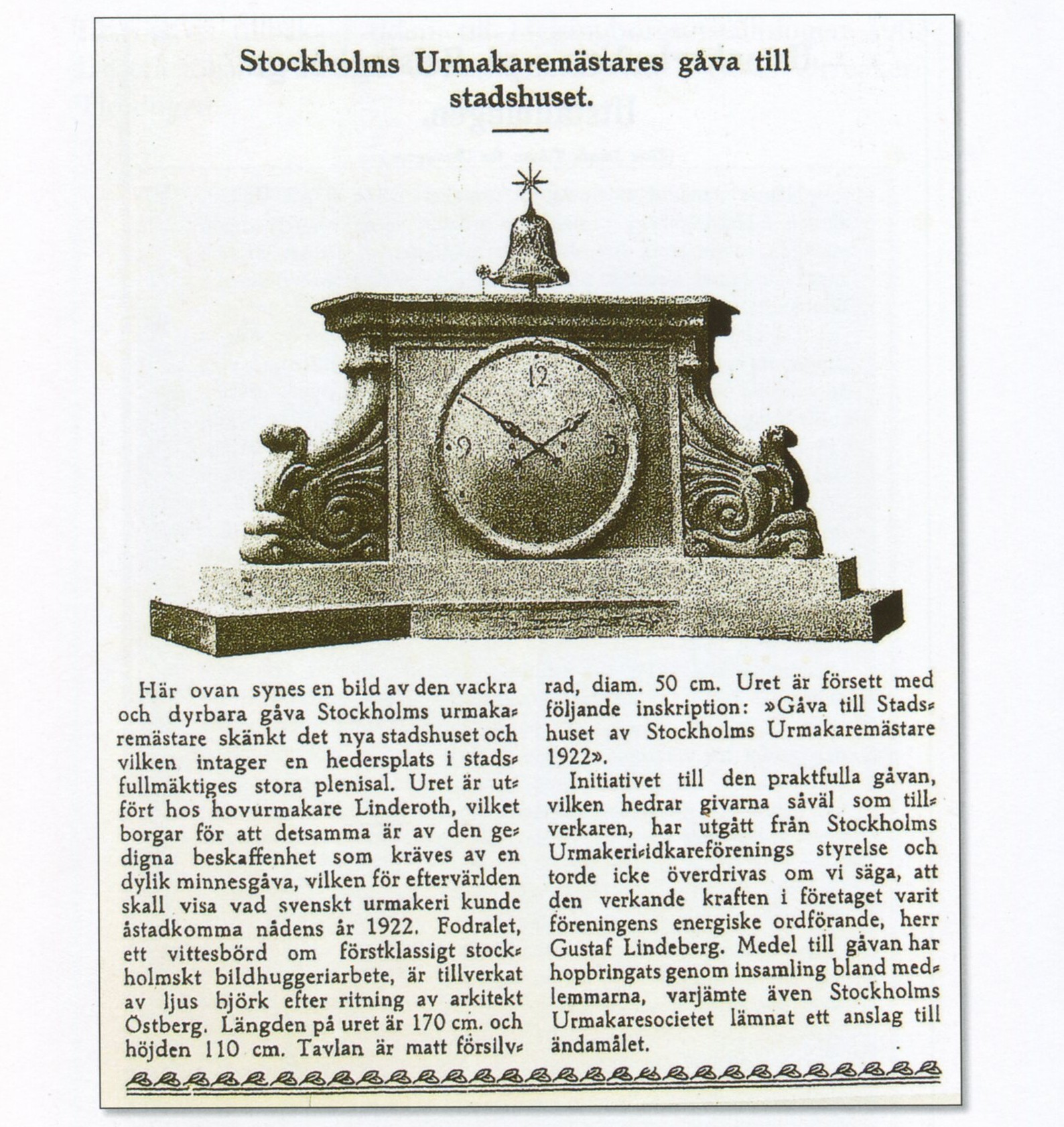 Klocka i Rådsalen på Stockholms stadshus tillverkat av Linderoths urfabrik